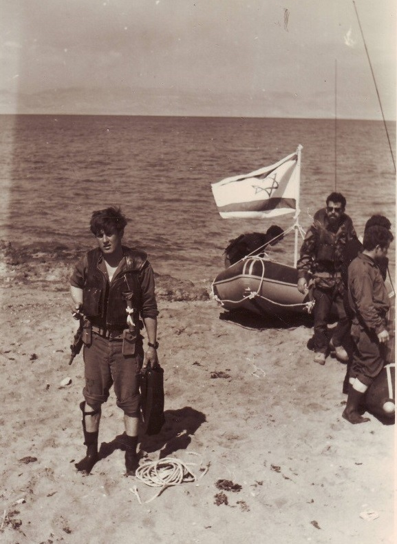 לוחם יואל פלג חמוש בתת מקלע עוזי ומאחרו מפקד היחידה שאול סלע בעת ביצוע סיורי הפגנת נוכחות בתעלת סואץ